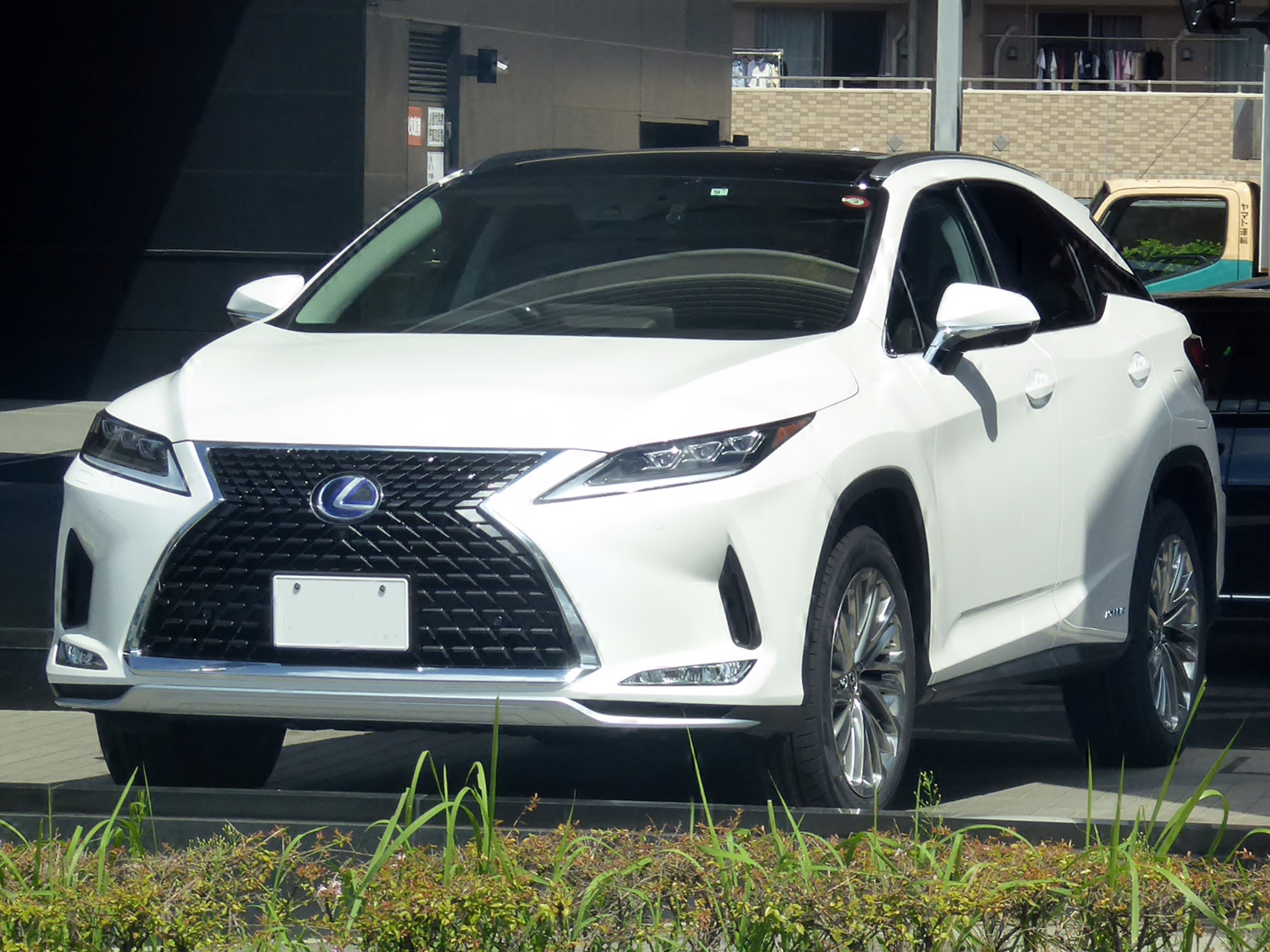 DAA-GYL25W-AWXGB型レクサス・RX450h"version L"を撮影。